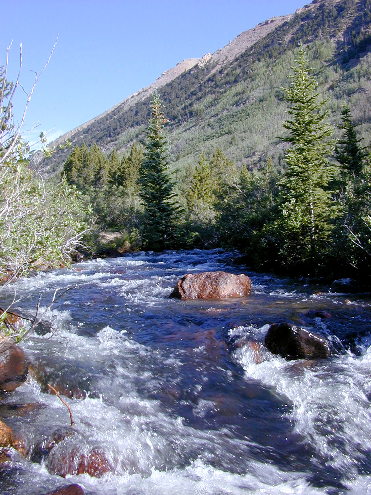 Near Alma, Colorado. Image for sale.